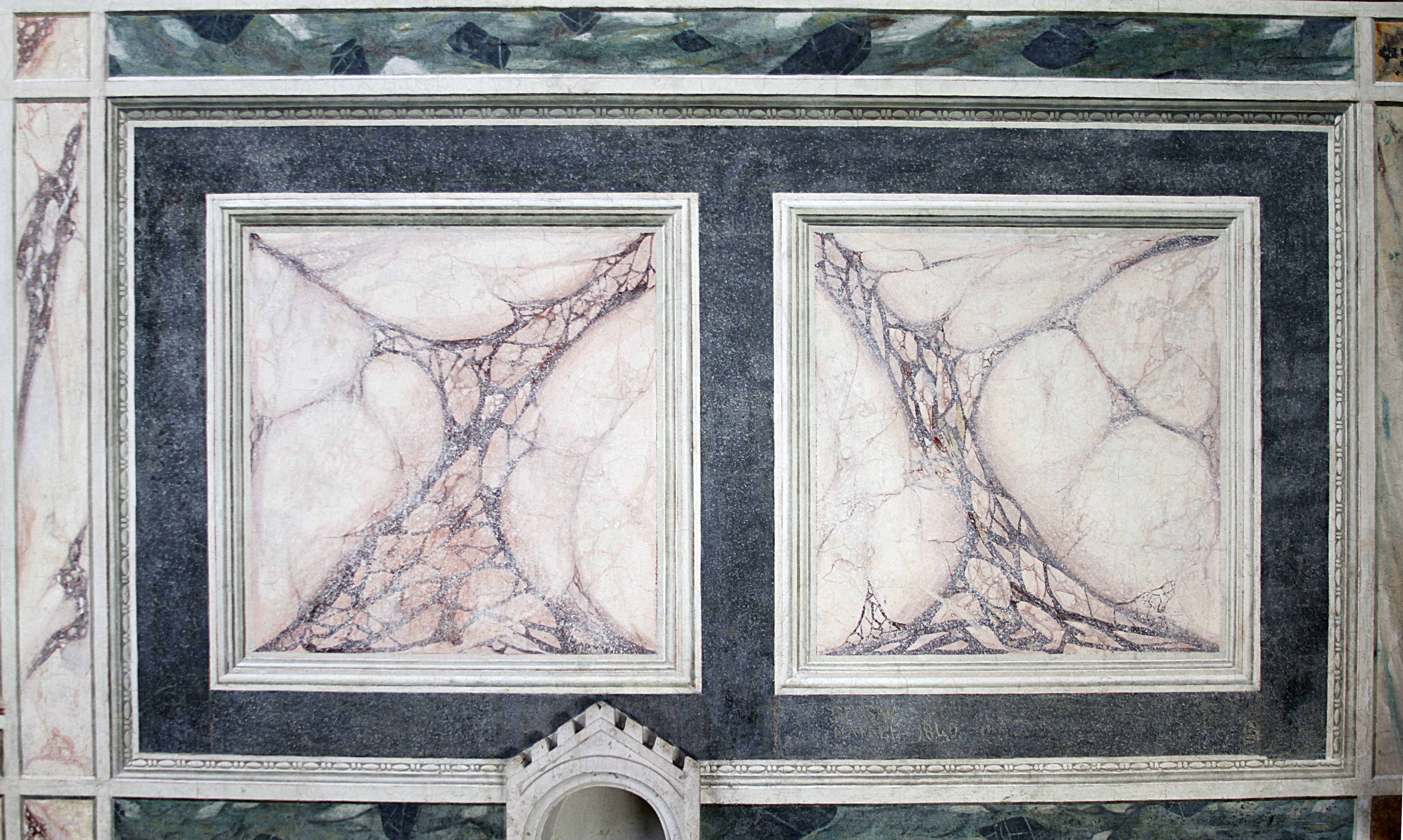 Capella dei Scrovegni - Padua